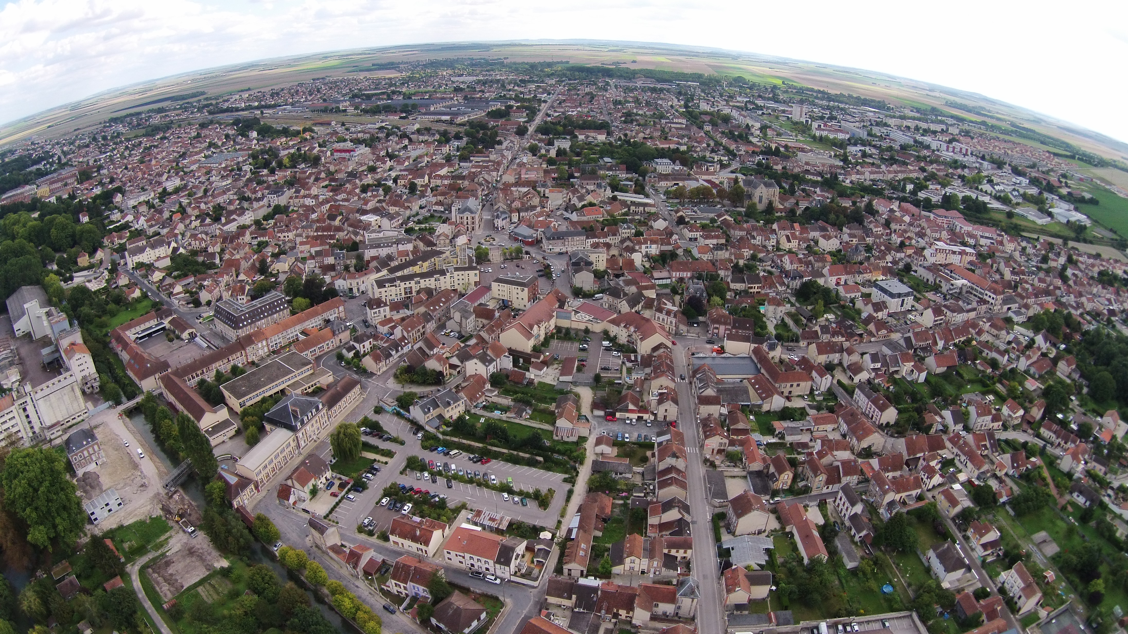 La ville de Romilly-sur-Seine, ses écoles, son patrimoine, ses espaces verts...